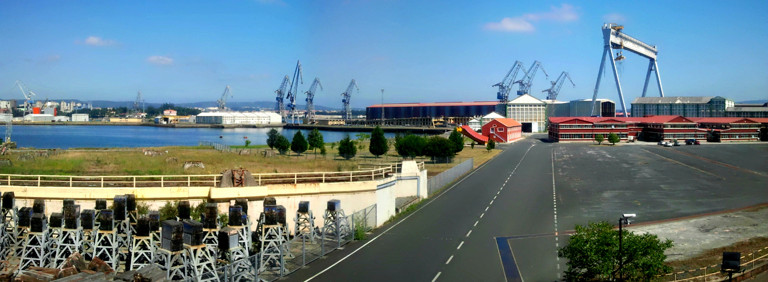 Astilleros Navantia Fene